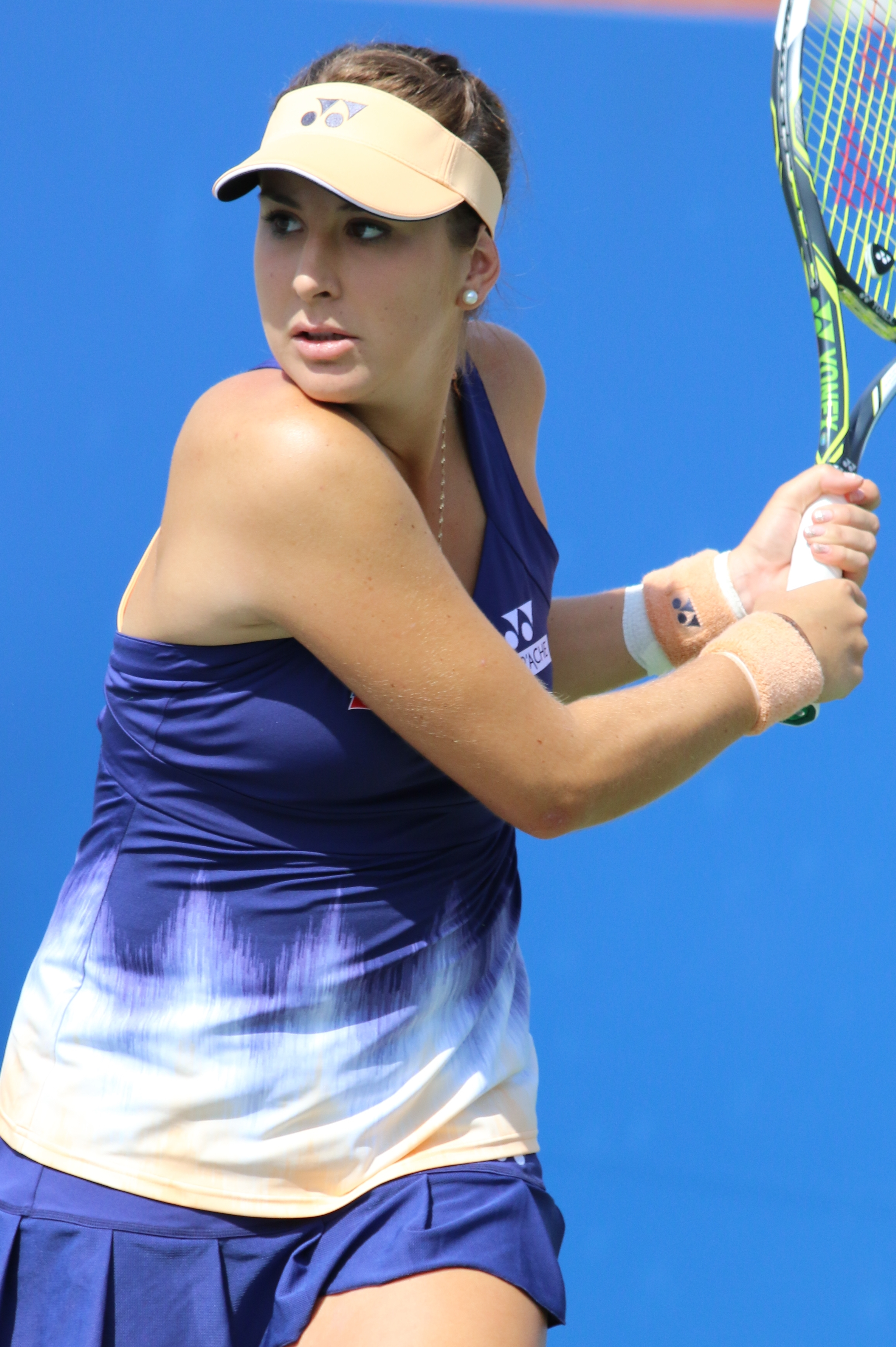 Bencic US16 (26)